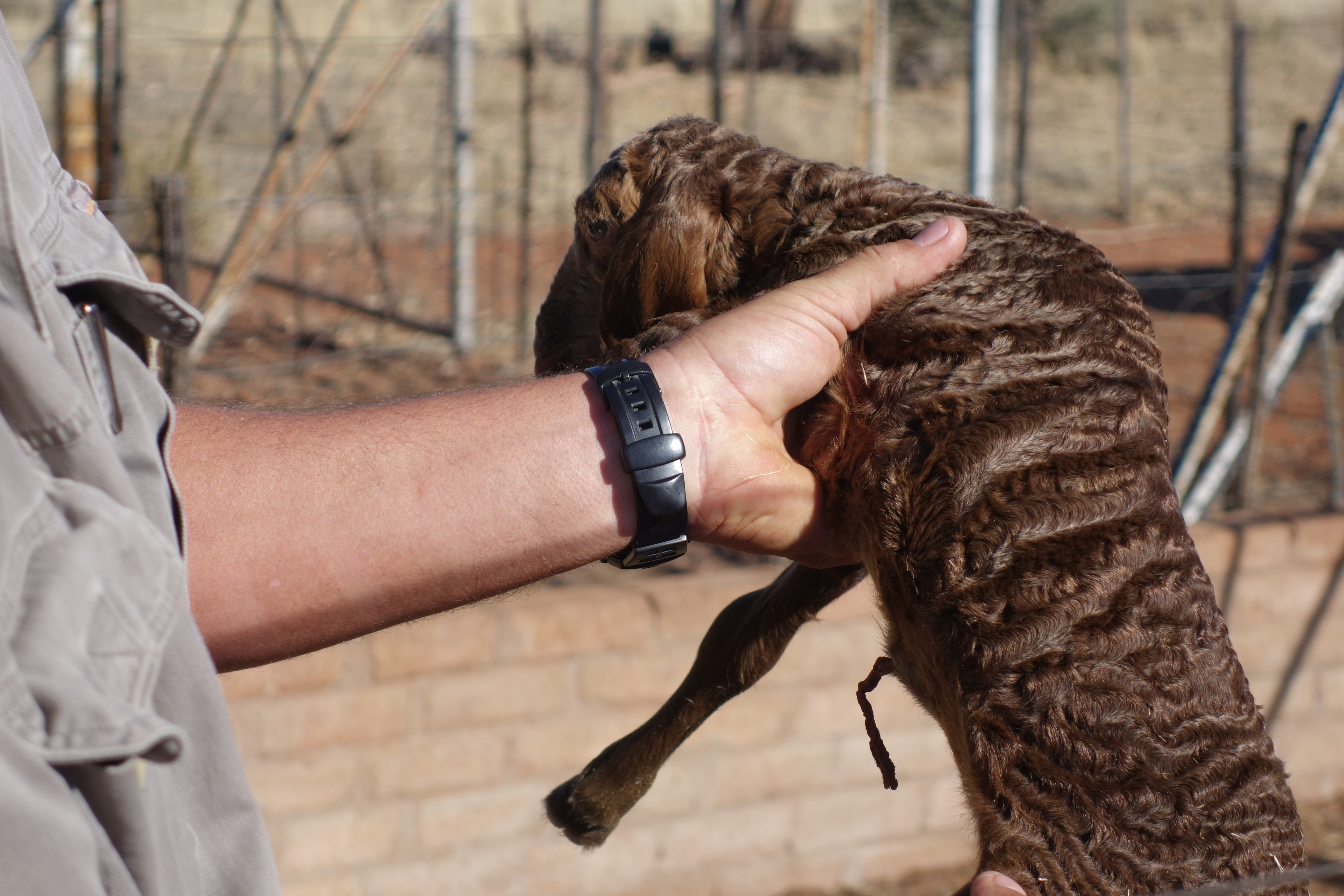 Namibia, Farm Beenbreck. Braunes Swakara-Lamm.